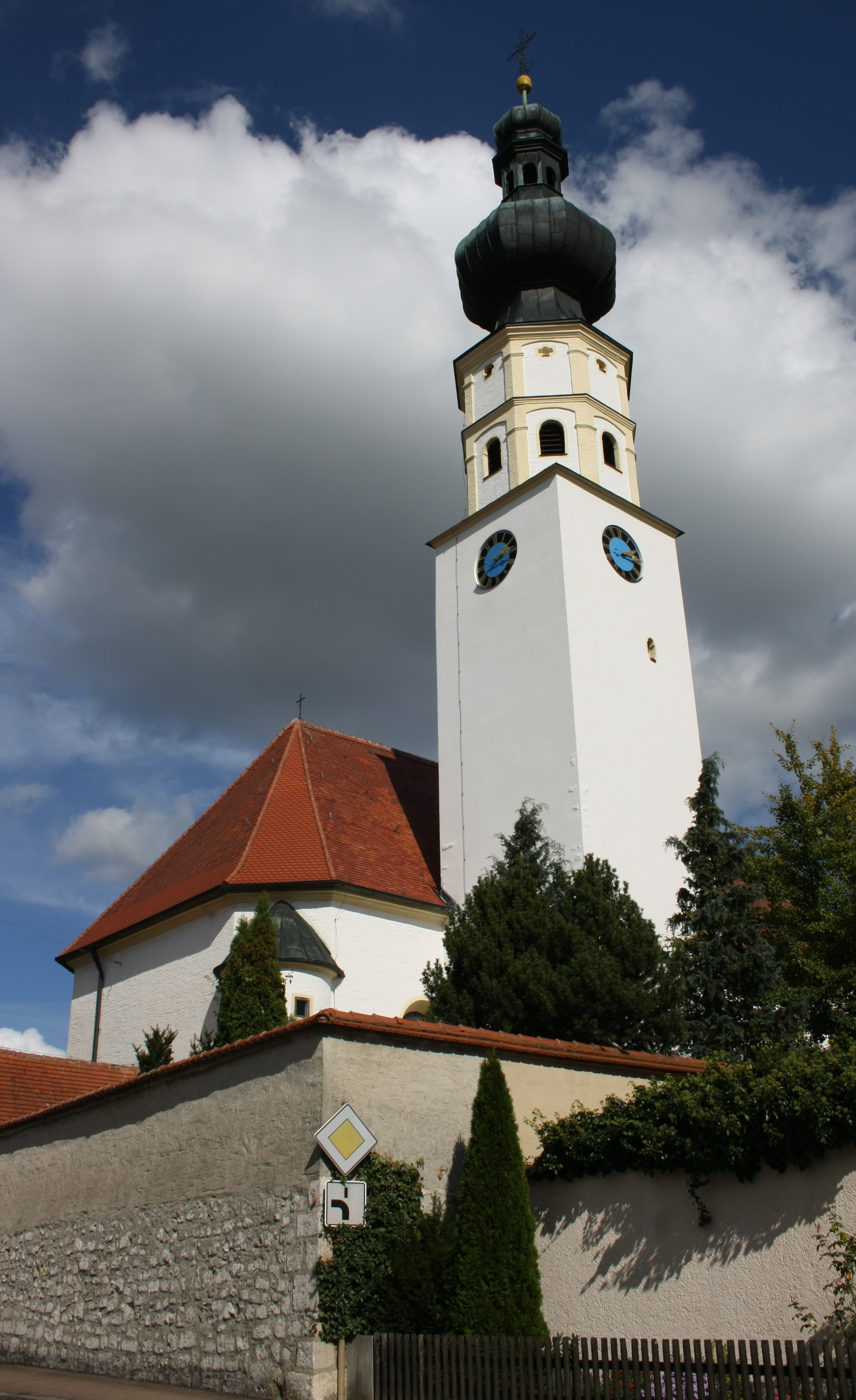 Katholische Pfarrkirche St. Vitus in Donaualtheim (Dillingen an der Donau), Ansicht von Südwesten